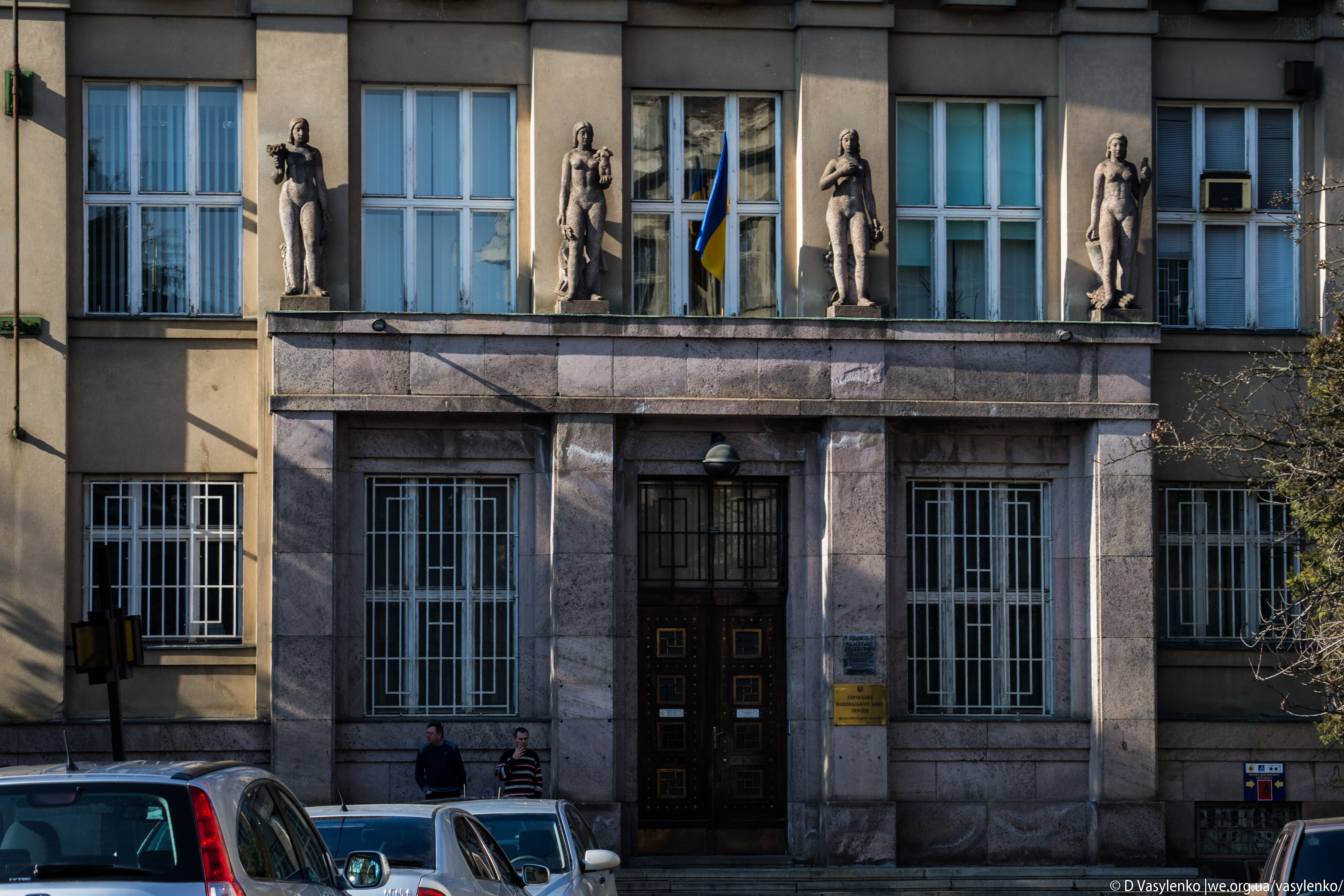 Ужгород (26)